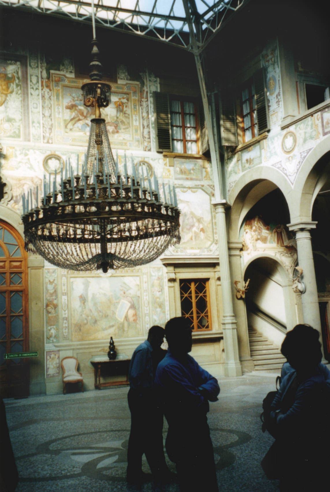 Villa la Petraia